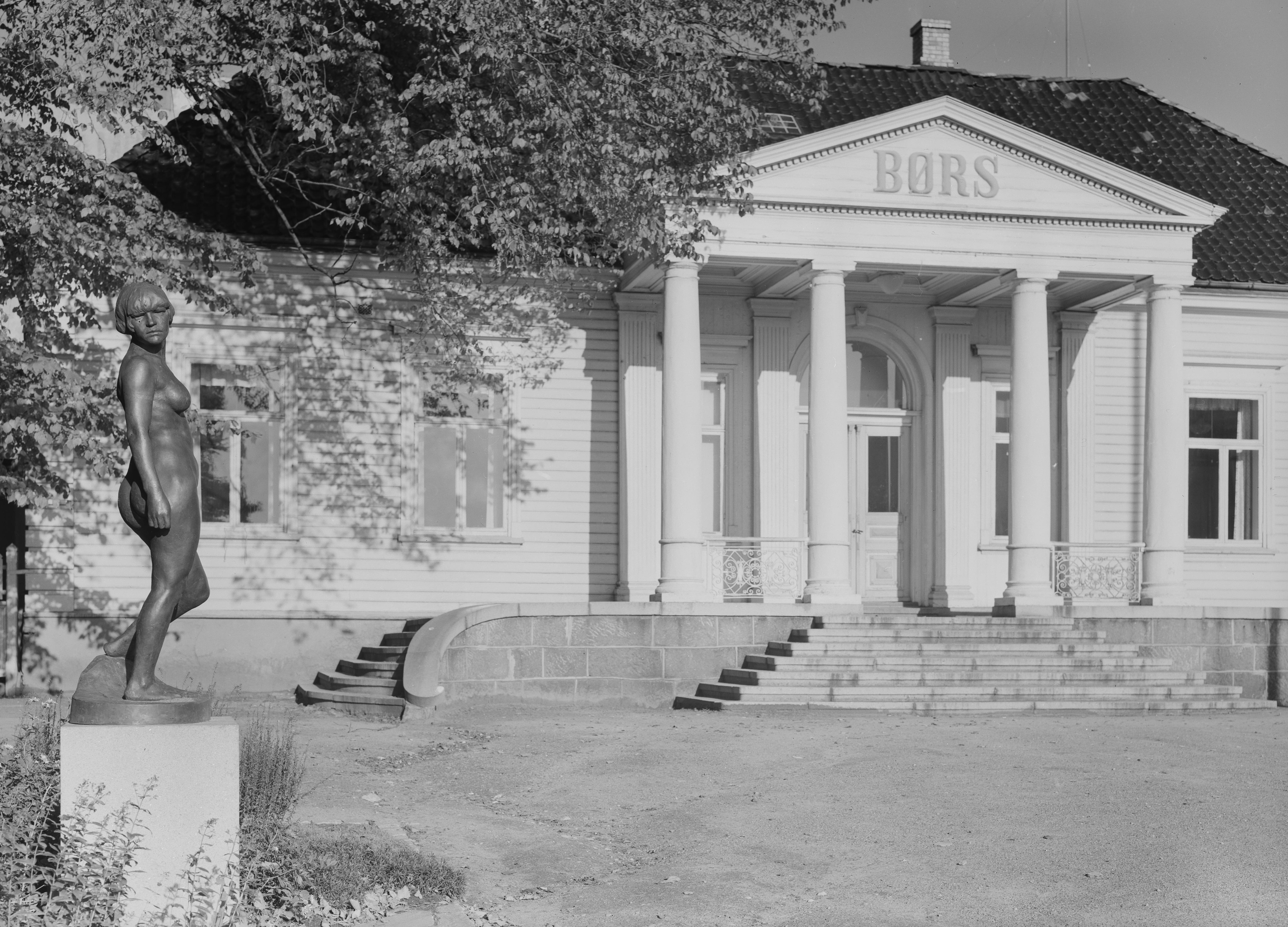 Bildet er hentet fra Nasjonalbibliotekets bildesamling. Anmerkninger til bildet var: Fotograf:Ukjent Kristiansand, Kristiansand, Vest Agder